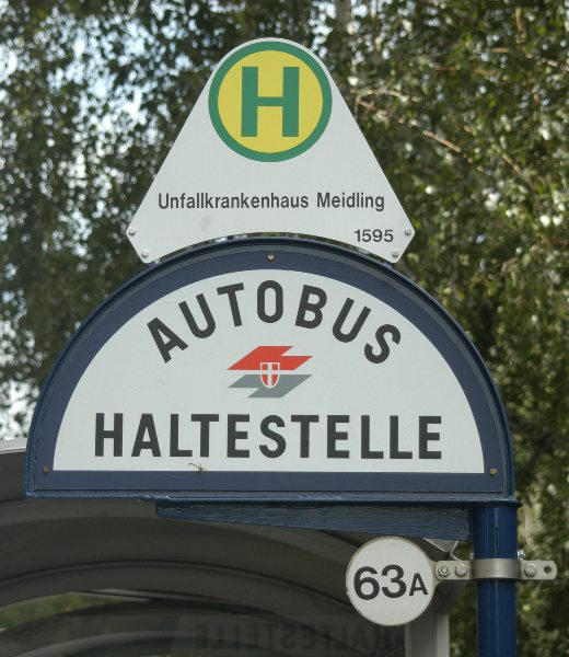 Neu gestaltete Haltestellentafel für Busstationen der Wiener Linien